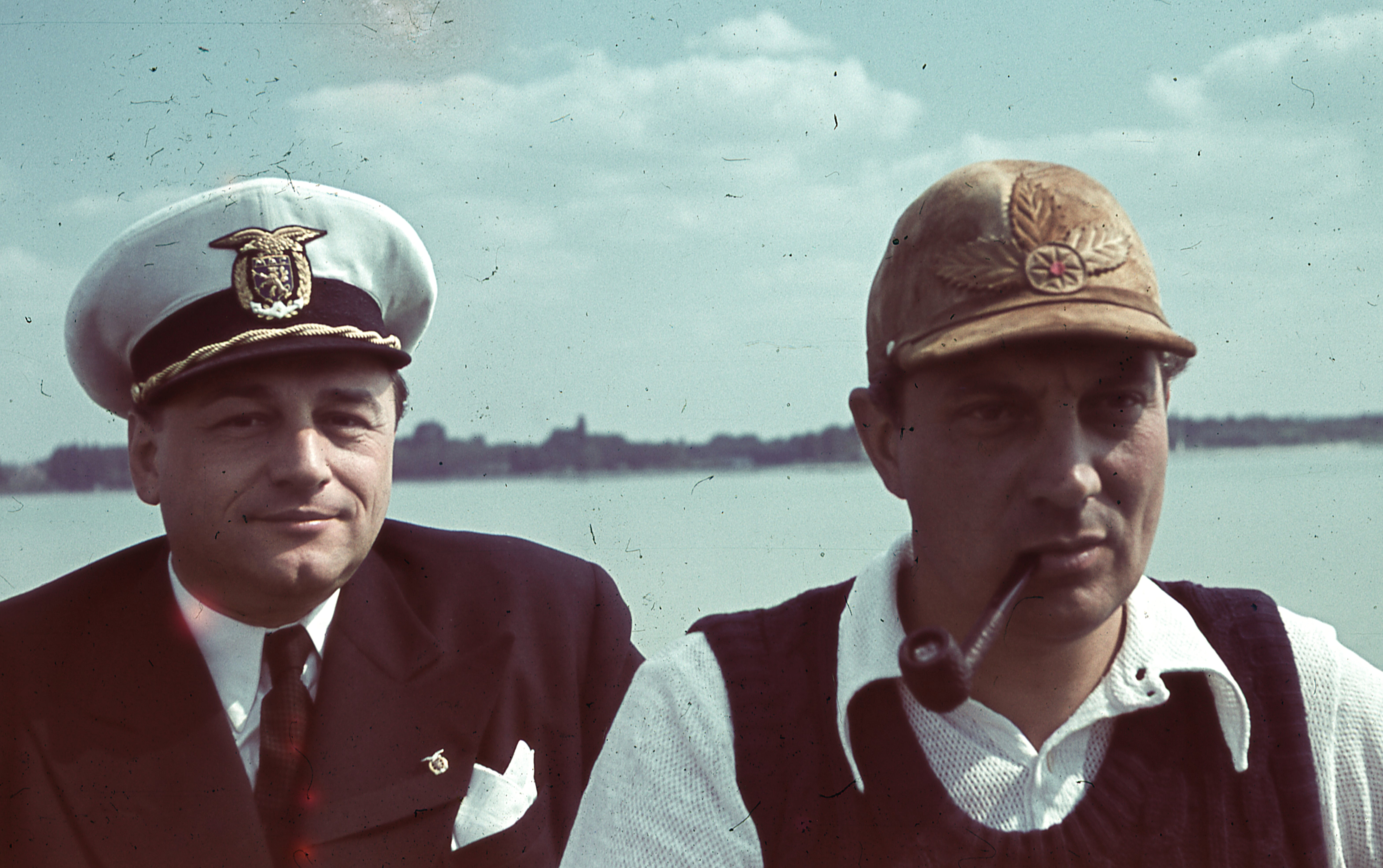 taplósapkában Hajmássy Miklós színművész. Location: Hungary, Lake Balaton Tags: colorful Title: taplósapkában Hajmássy Miklós színművész.